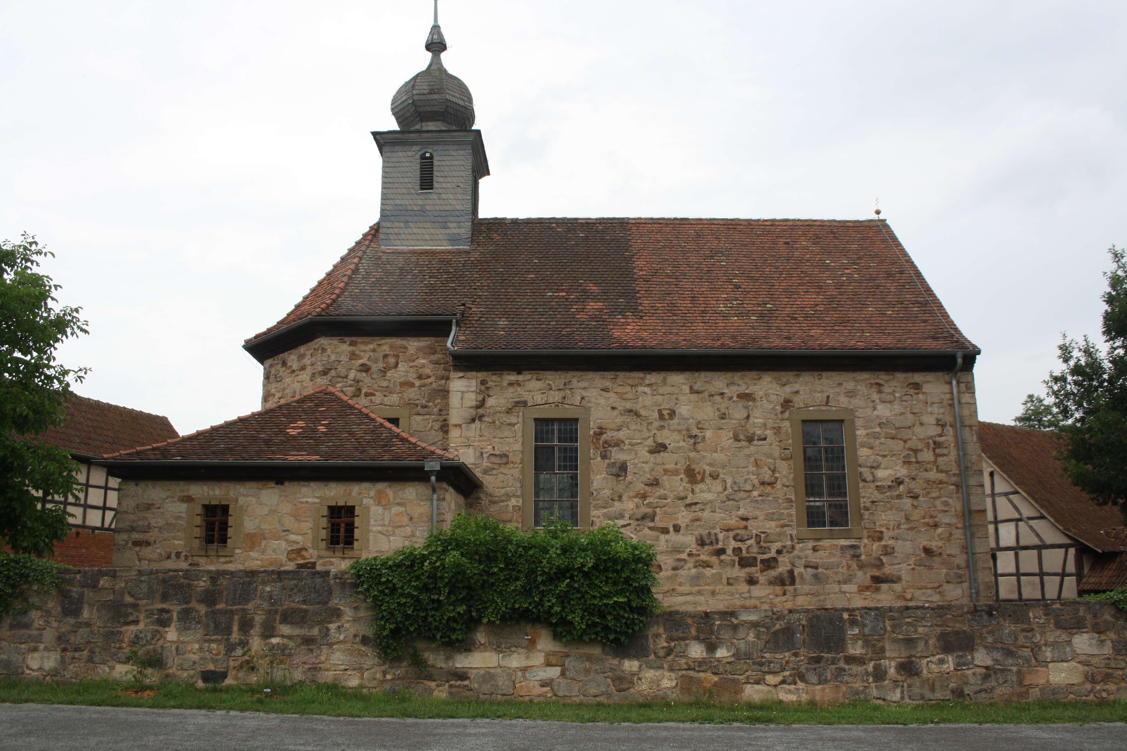 Kirche im Fränkischen Freilandmuseum, Fladungen